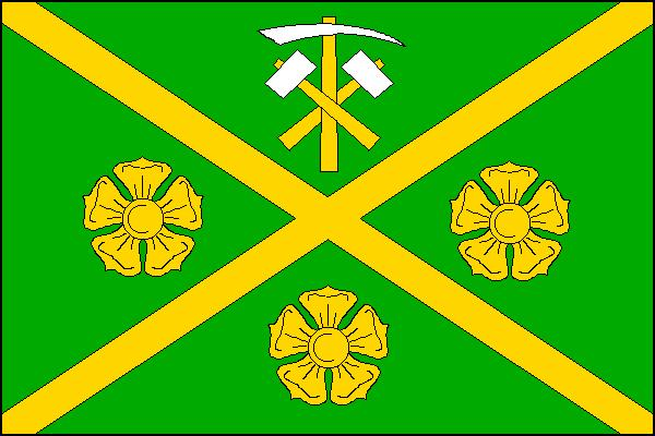 Vlajka obce Rudka